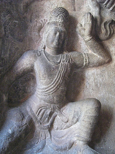 பல்லவர் காலத்திய குடைவரைக் கோயில்களில் விளங்கும் சிலைகளின் அழகிய வடிவம்